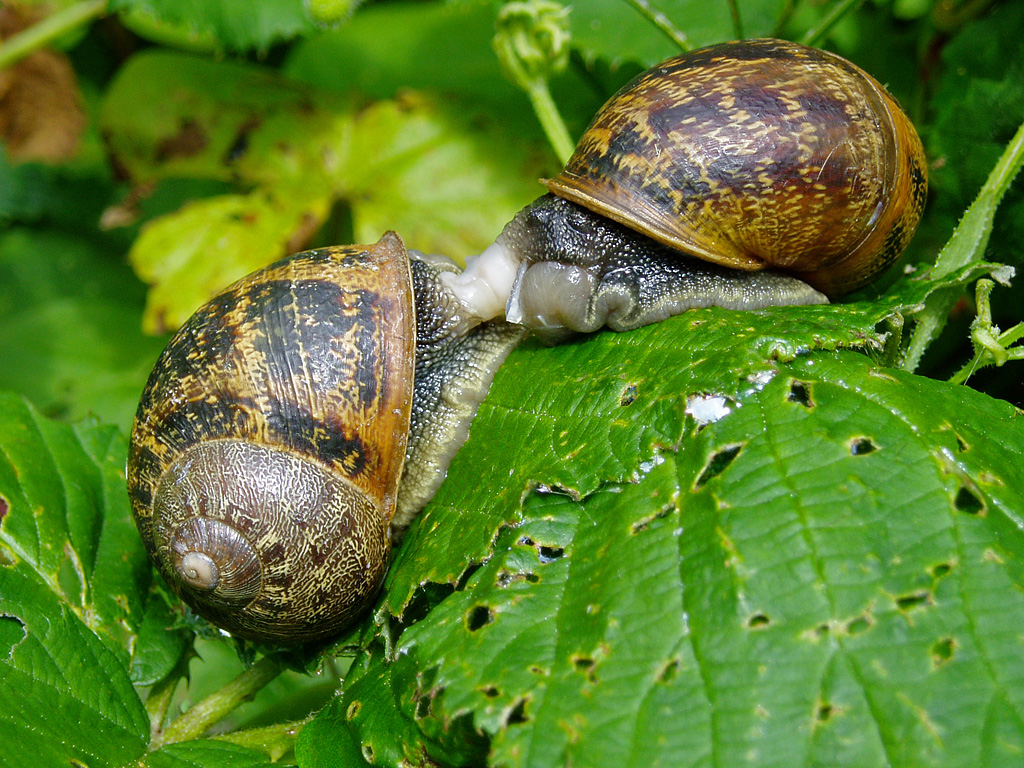 Mollusc_garden_snails_20070712_0113